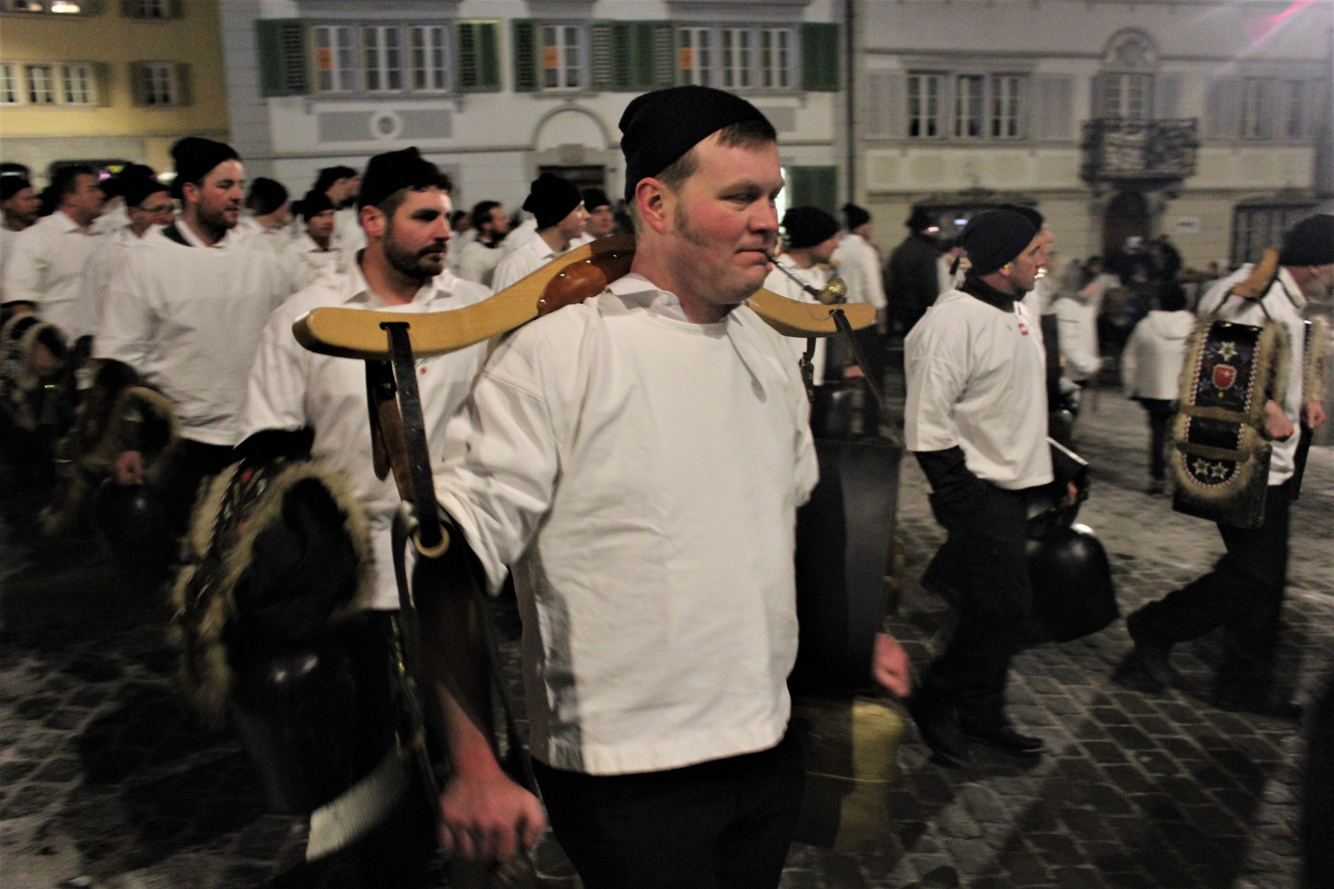 Einzug der Schwyzer Greifler auf den Hauptplatz in Schwyz am Dreikönigsabend 2017